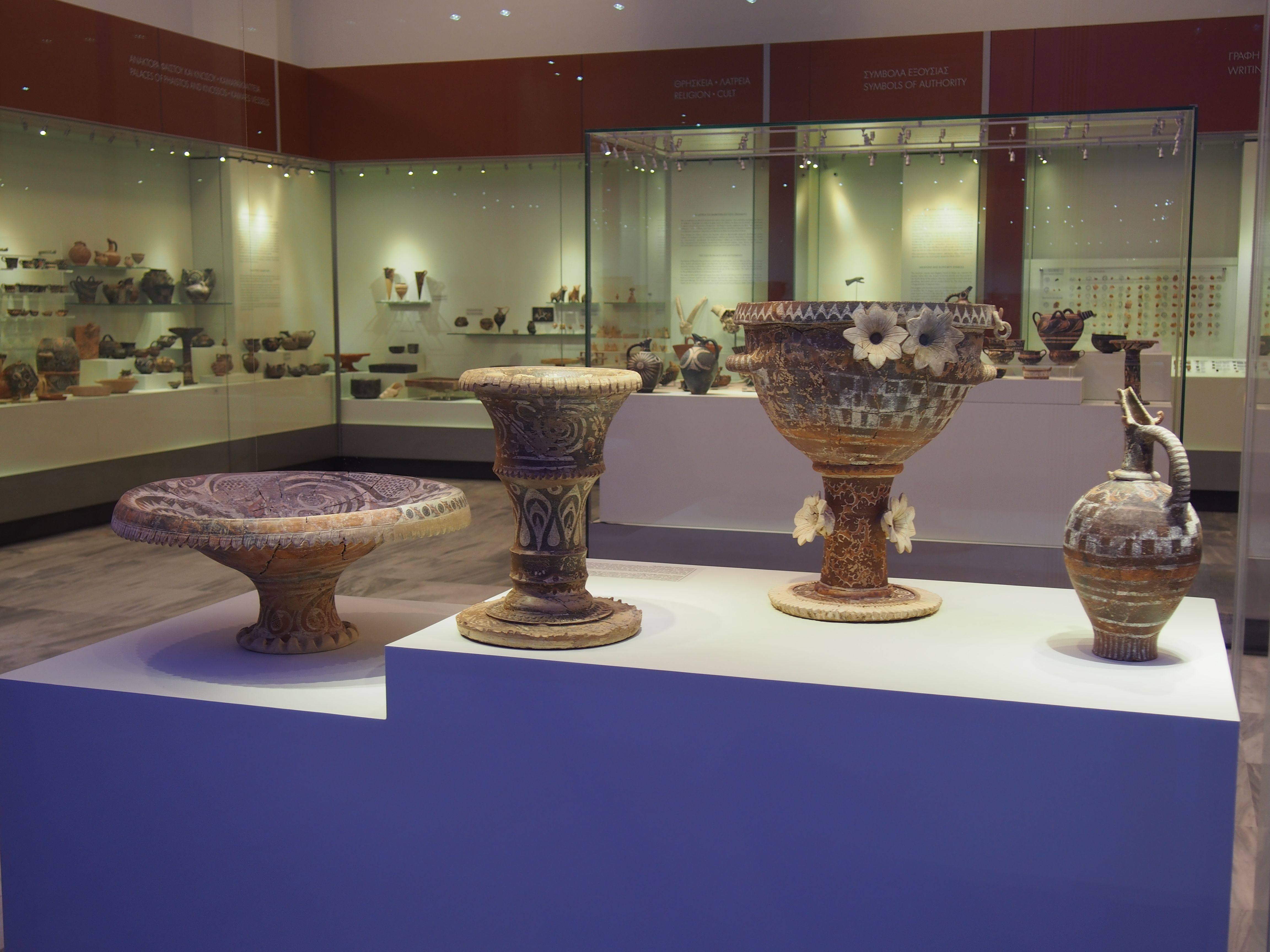 Καμαραϊκά αγγεία, αρχαιολογικό μουσείο Ηρακλείου